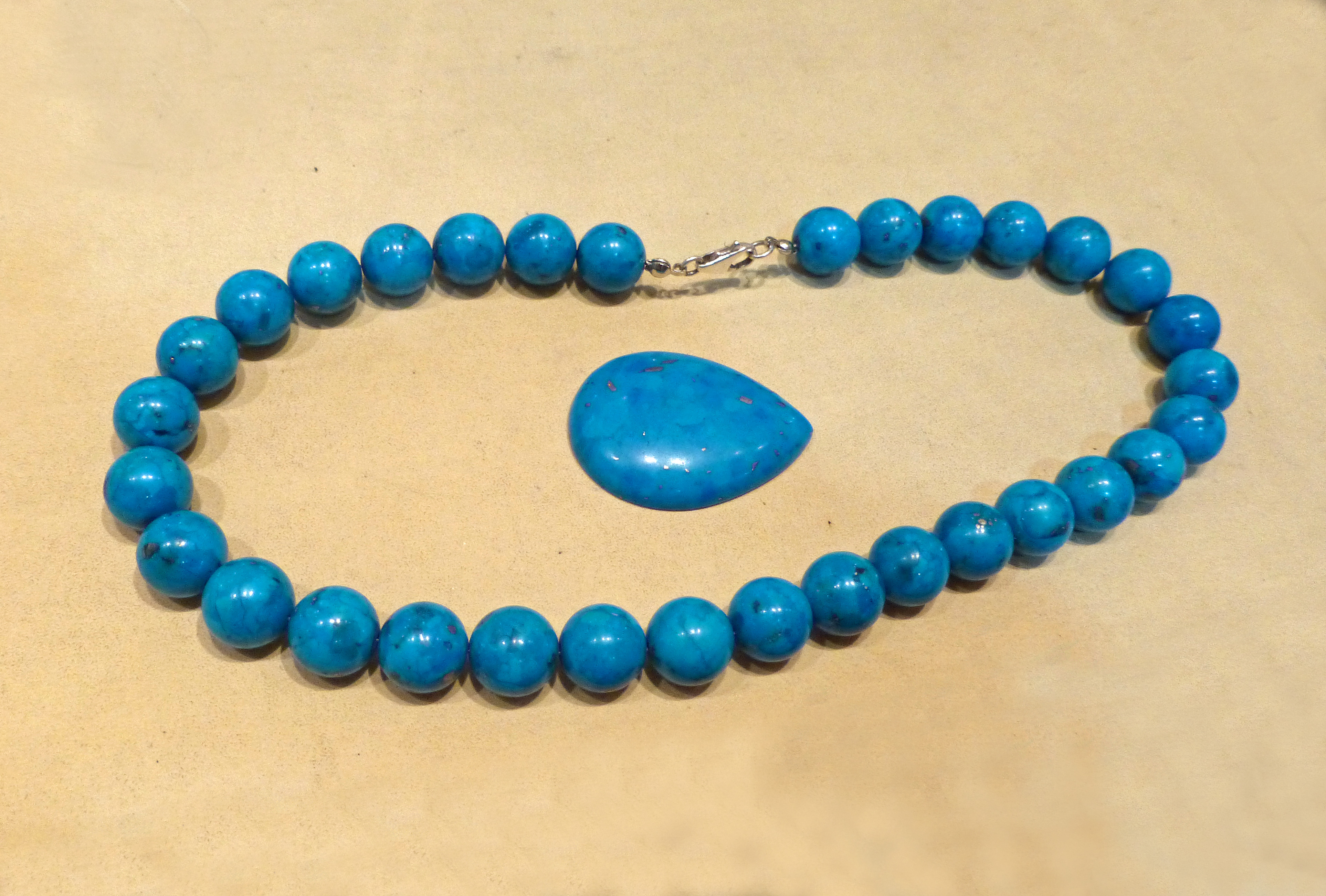 Bijoux en turquoise de Turquie (en vente à Uçhisar)